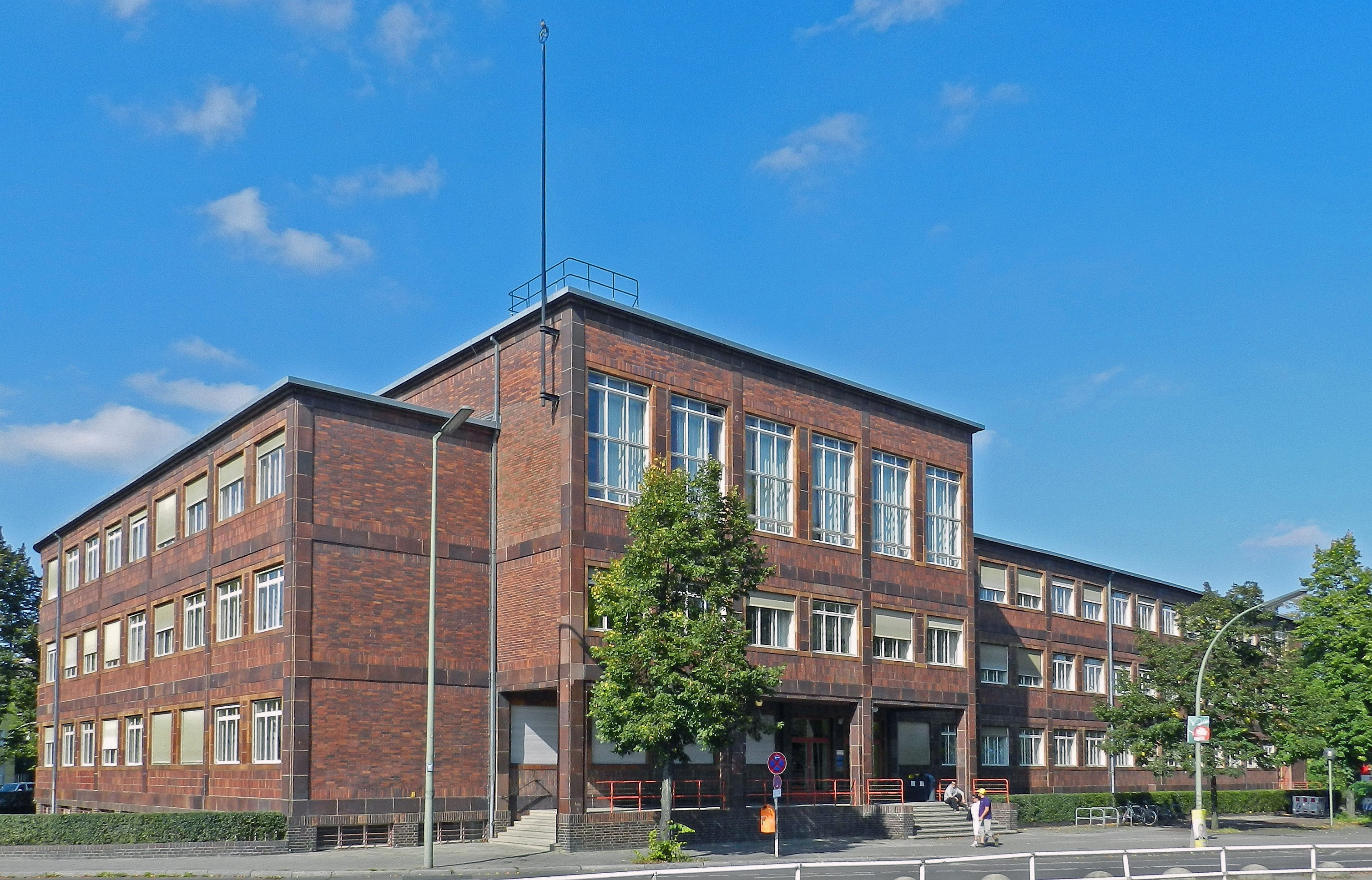 Verwaltungsgebäude Rüdesheimer Str. 54-56, Berlin-Wilmersdorf. Bauzeit: 1929-30, Entwurf: Max Taut und Franz Hoffmann, Bauherr: Reichsknappschaft.